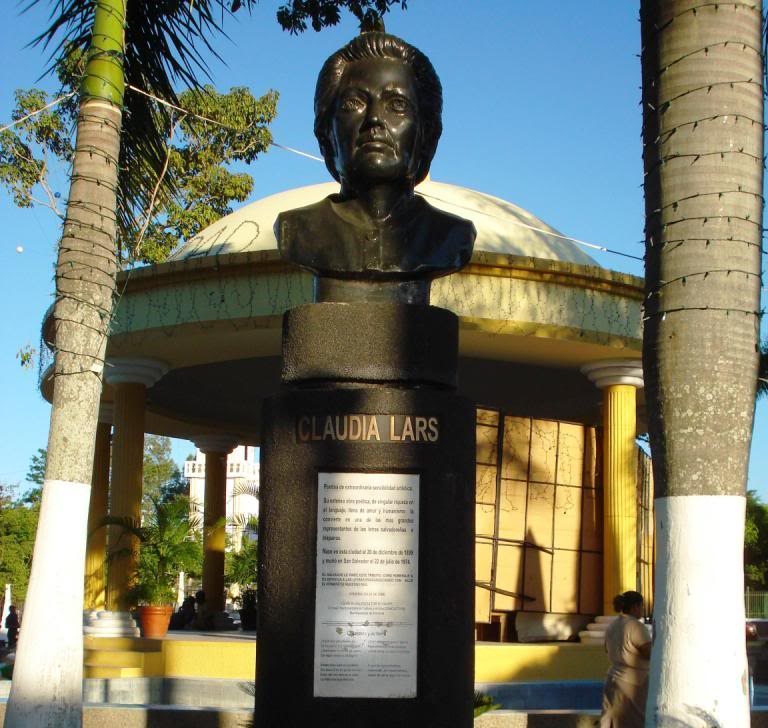 Busto de Caludia Lars En Armenia, Sonsonate